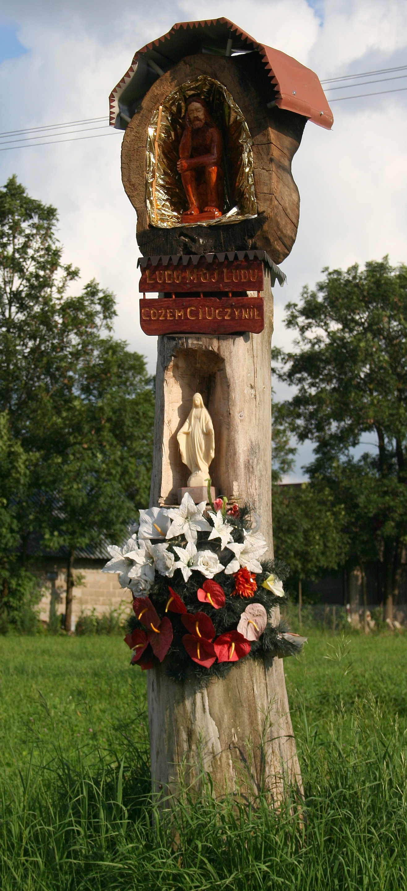 Kapliczka we wsi Romaszkówka, woj. podlaskie